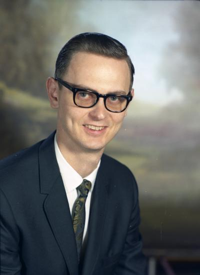 Senator Gary M. Odegaard